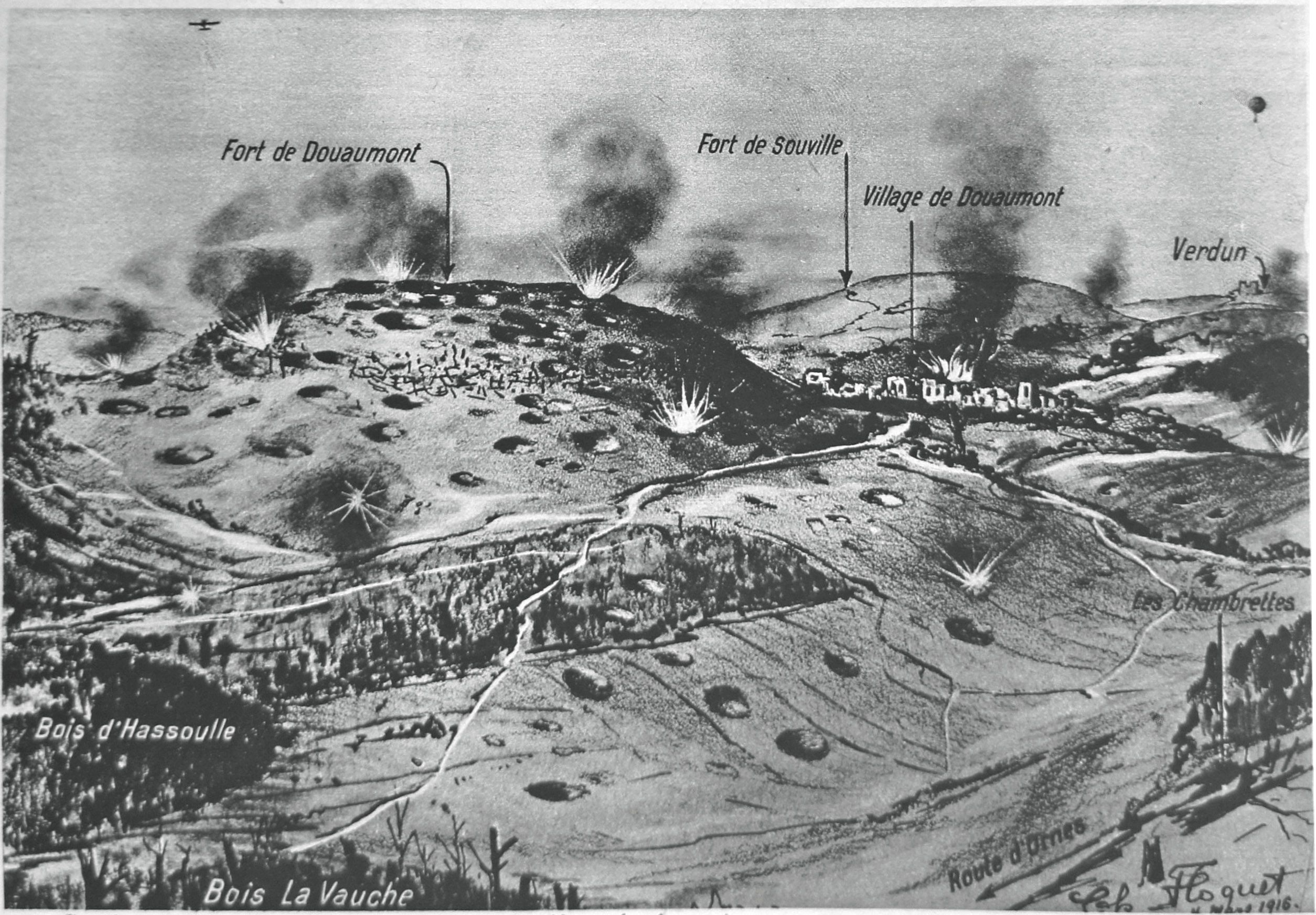 Le Mirori_N°122; page_2, une_carte_des forts_de_Douaumont, et des villages.